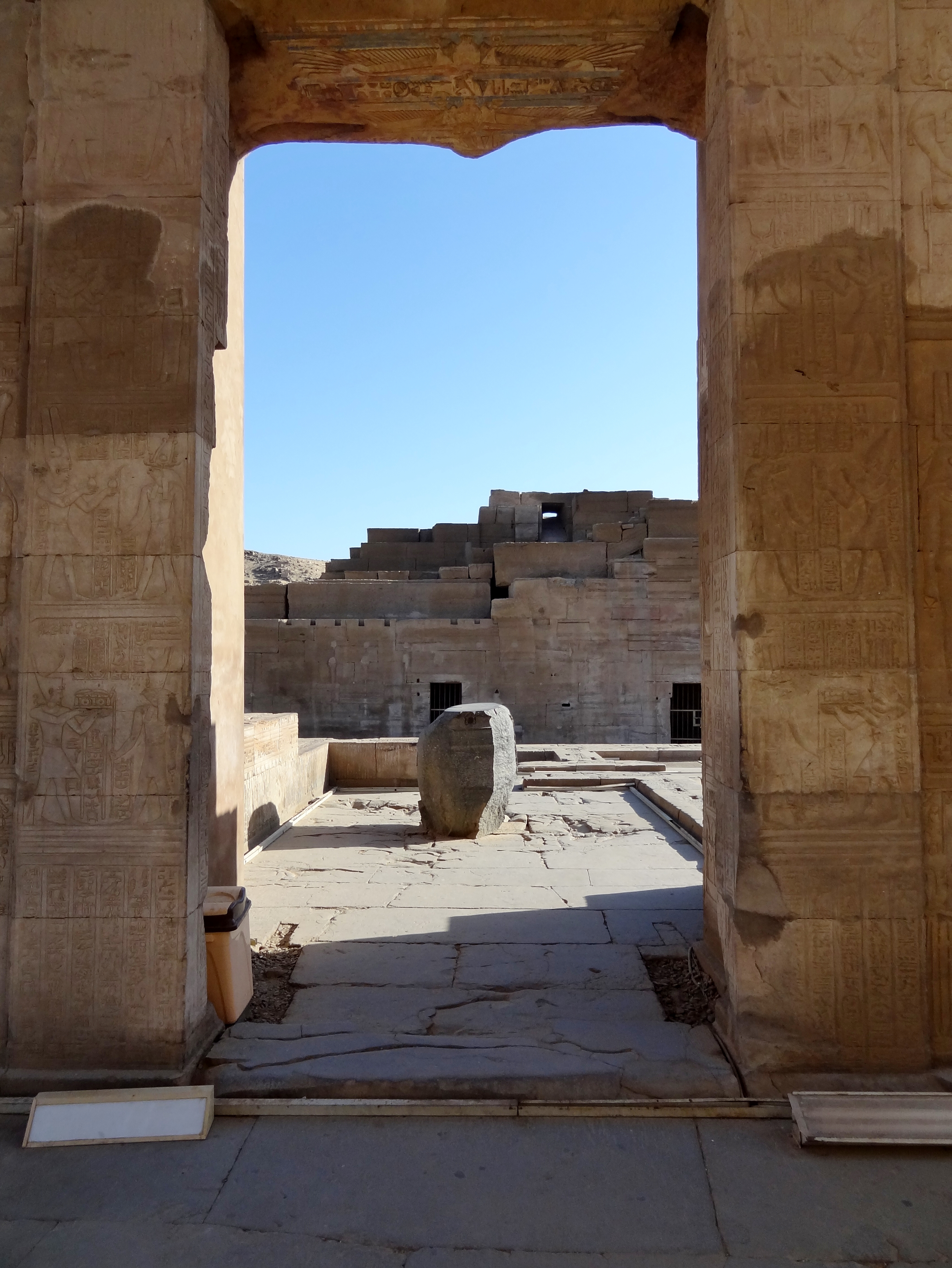 Zugang zum Heiligtum des Haroeris im Tempel von Kom Ombo, Ägypten